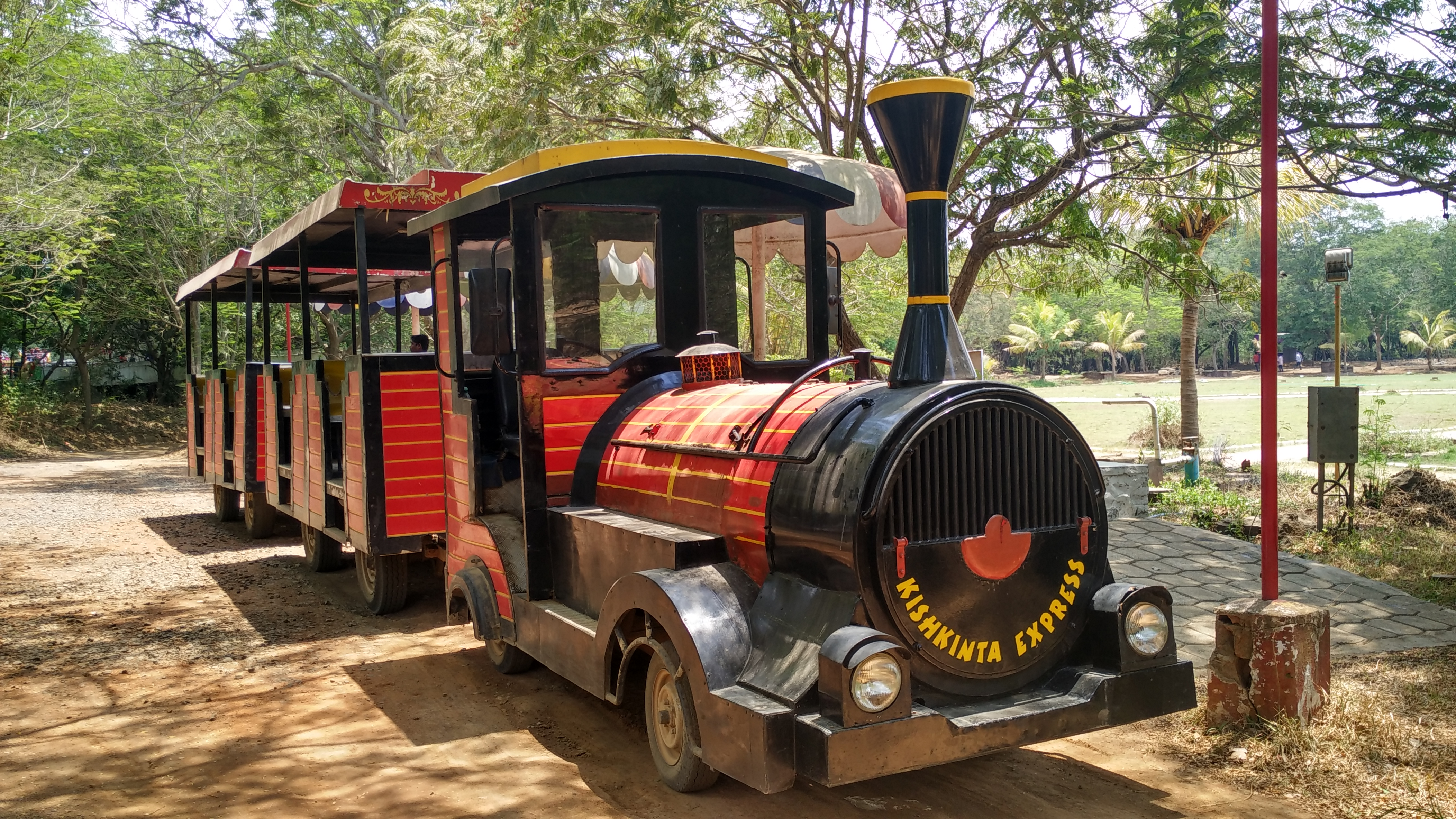 கிசுகிந்தாவில் (கிஷ்கிந்தா) உள்ள தொடருந்து, சென்னை, தமிழ்நாடு.